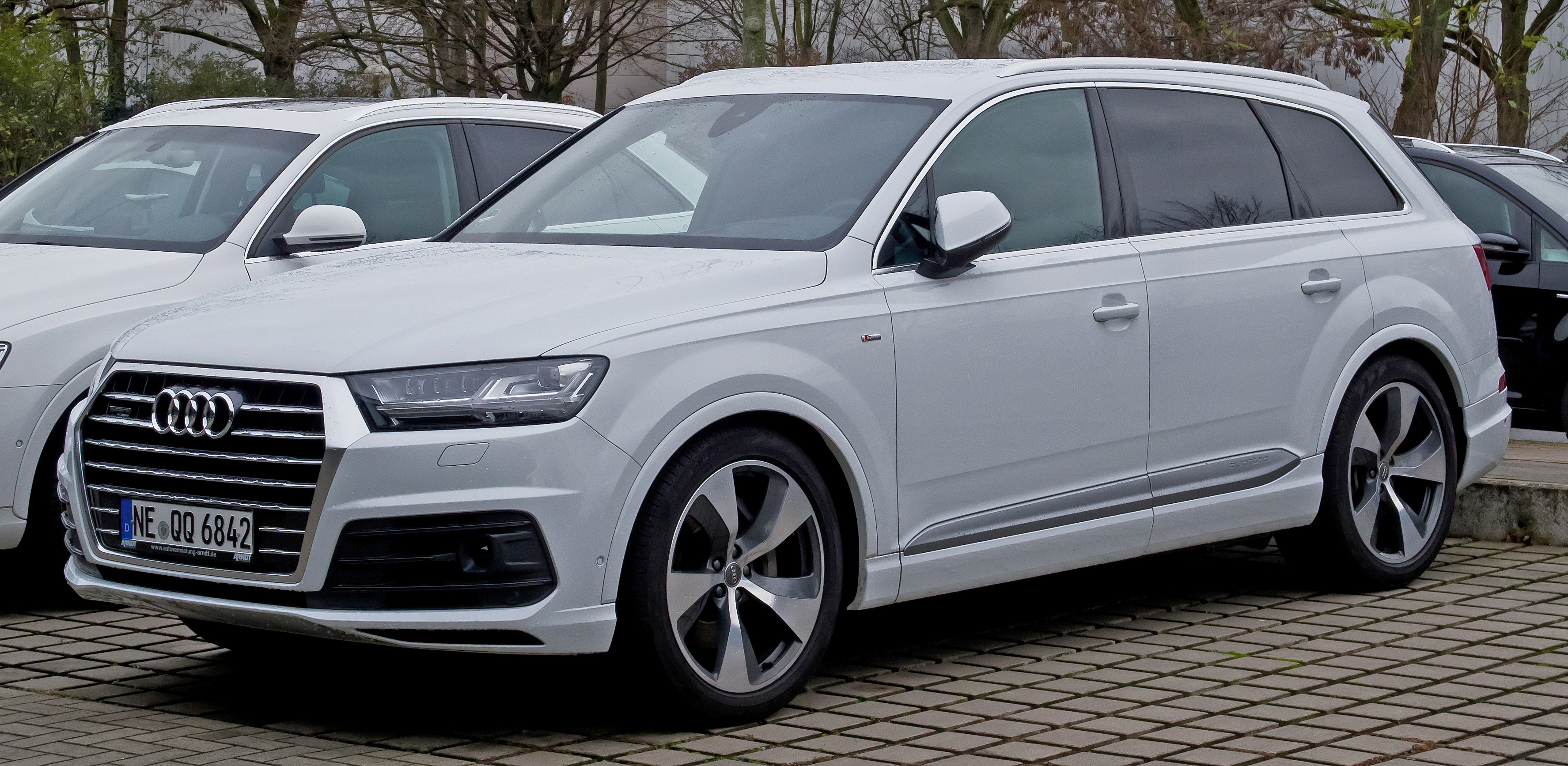 Audi Q7 3.0 TDI quattro S-line (II)